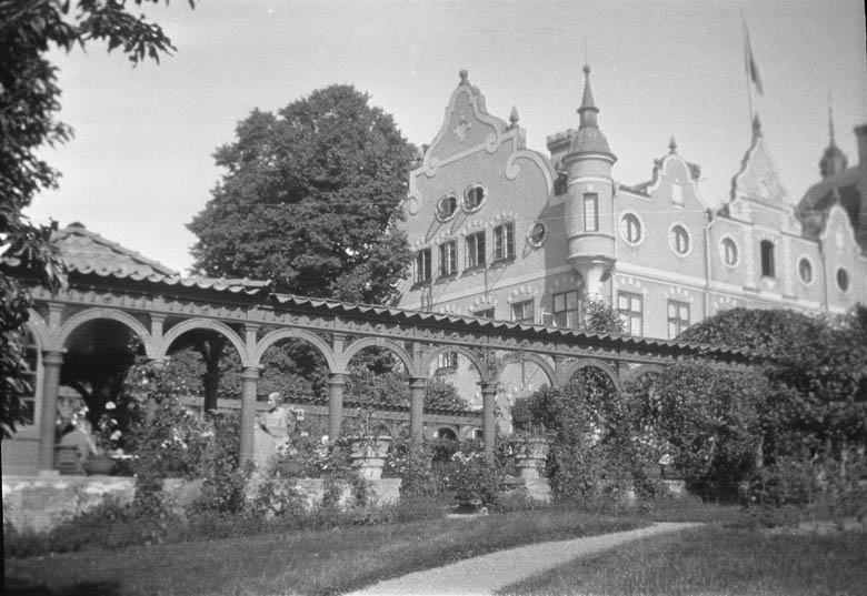 Lovö - Malmvik, Foto Berit Wallenberg, 1932, Riksantikvarieämbetet